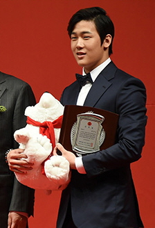 제19회 코카-콜라 체육대상 : 제1부